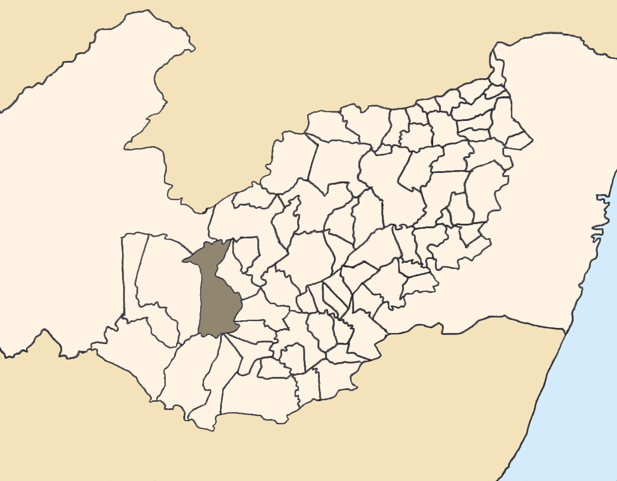 Mapa da mesorregião Agreste de Pernambuco (Brasil) subdivida em municípios. Em destaque, o município de Pedra. Map of the brazilian state of Pernambuco (mesorregião Agreste) showing the city of Pedra. Imagem tratada com o GIMP. Image made with GIMP.